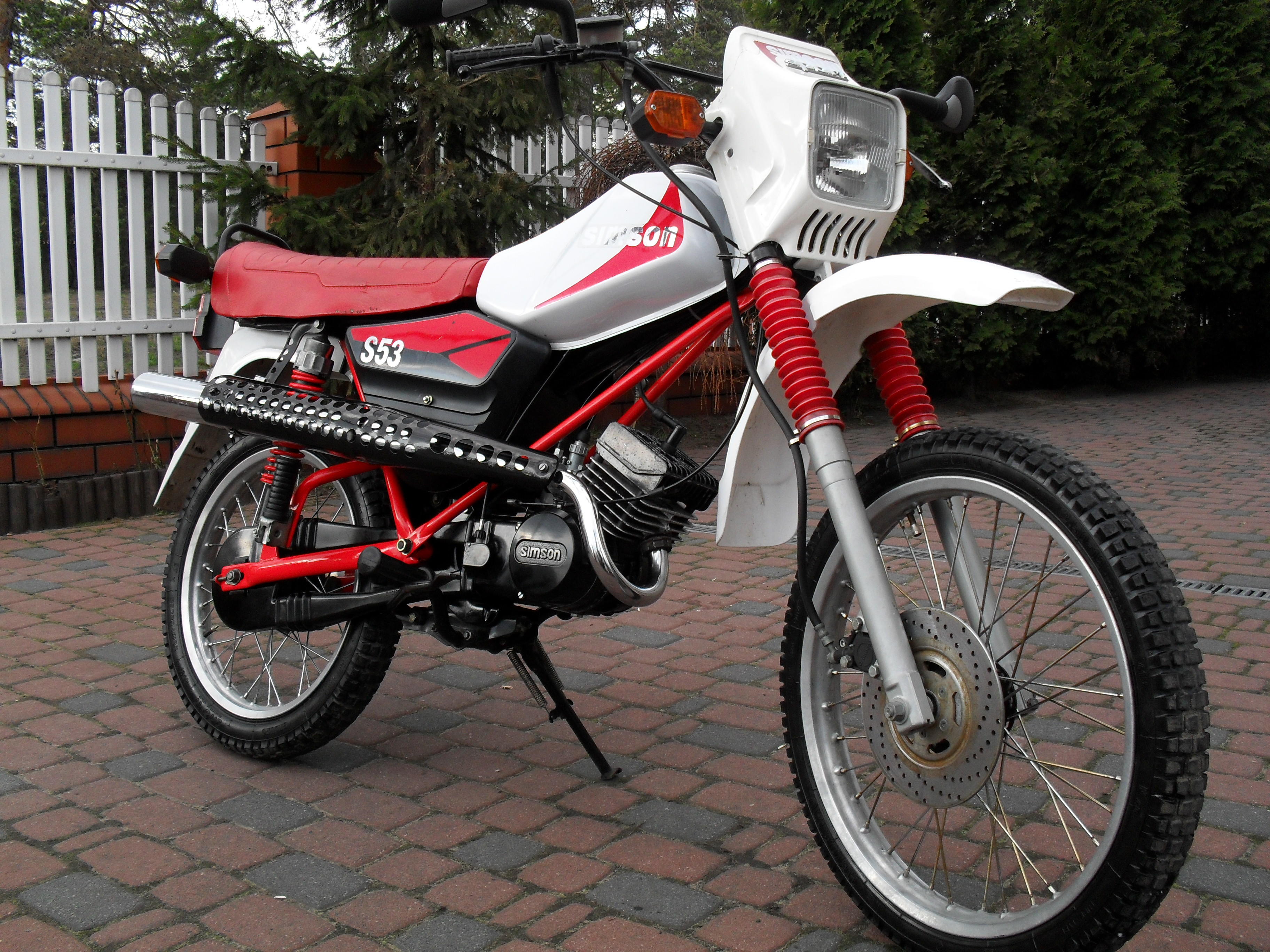 Zdjęcie przedstawiające motorower Simson S53 OR.